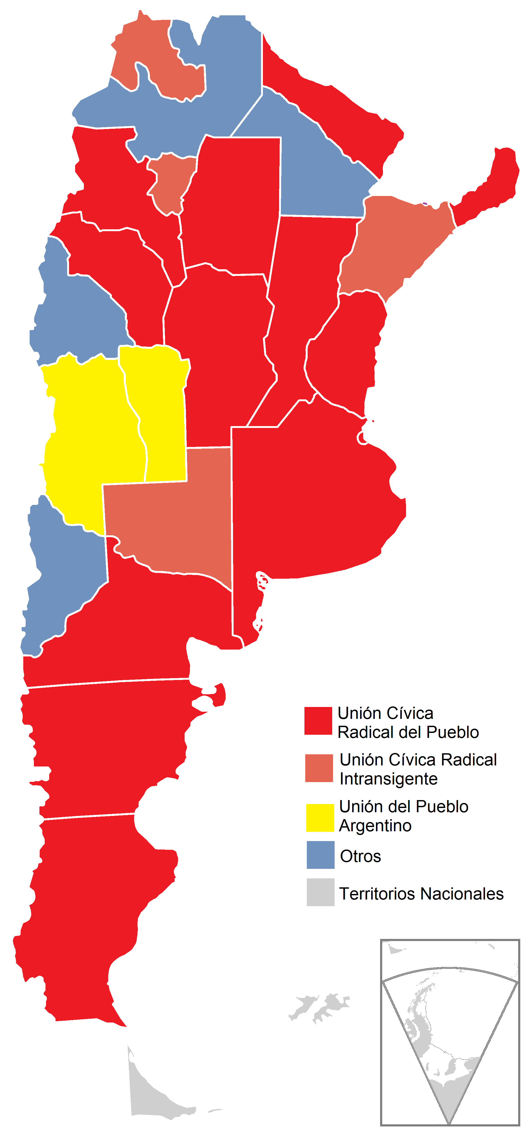 Mapa de las elecciones presidenciales de Argentina de 1963